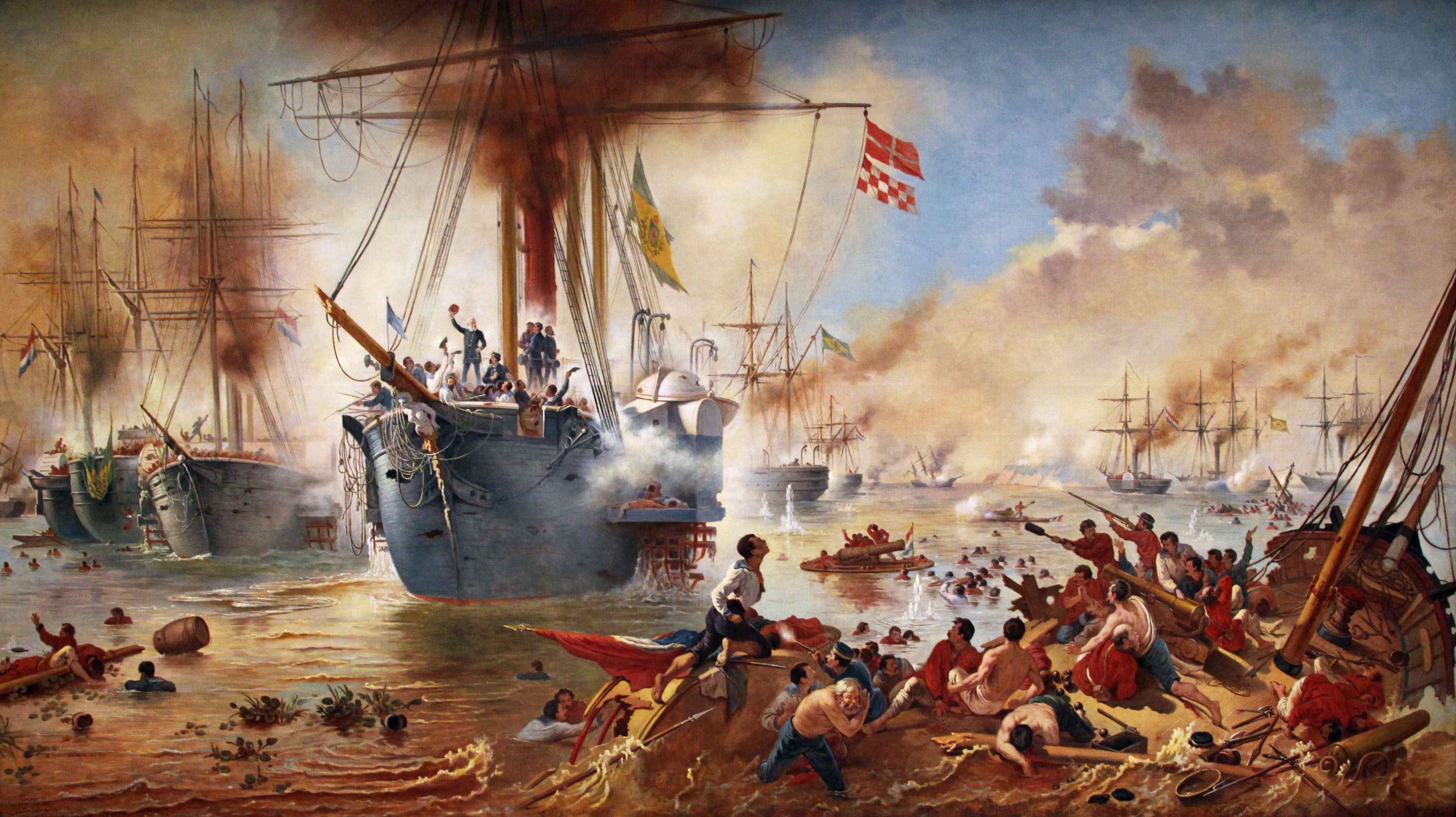 Cópia do original de Vitor Meirelles: a Batalha Naval do Riachuelo. Dim. 2,00m x 1,15m. Autor: Oscar Pereira da Silva (1867-1939).